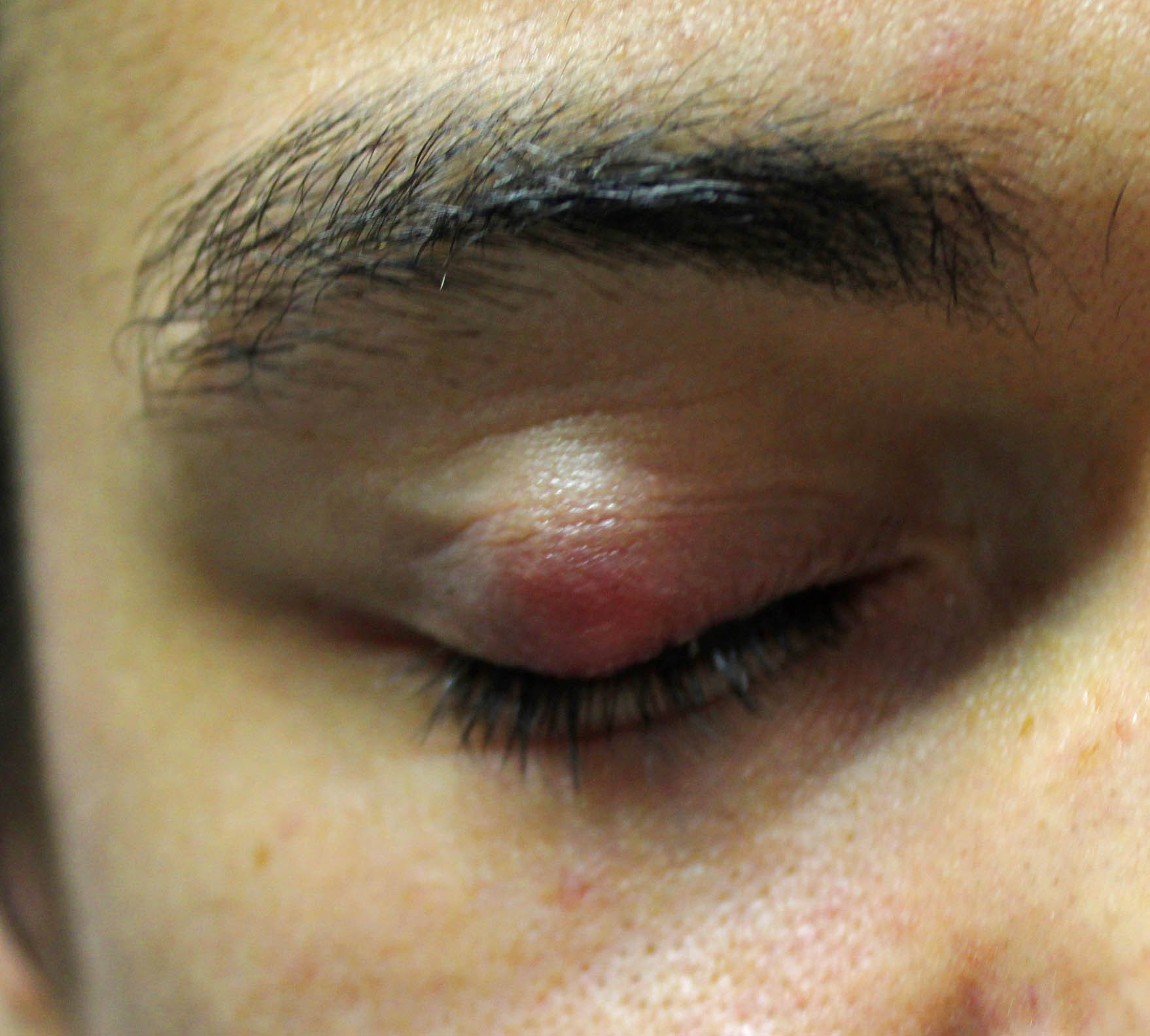 Chalazion sur un oeil droit.